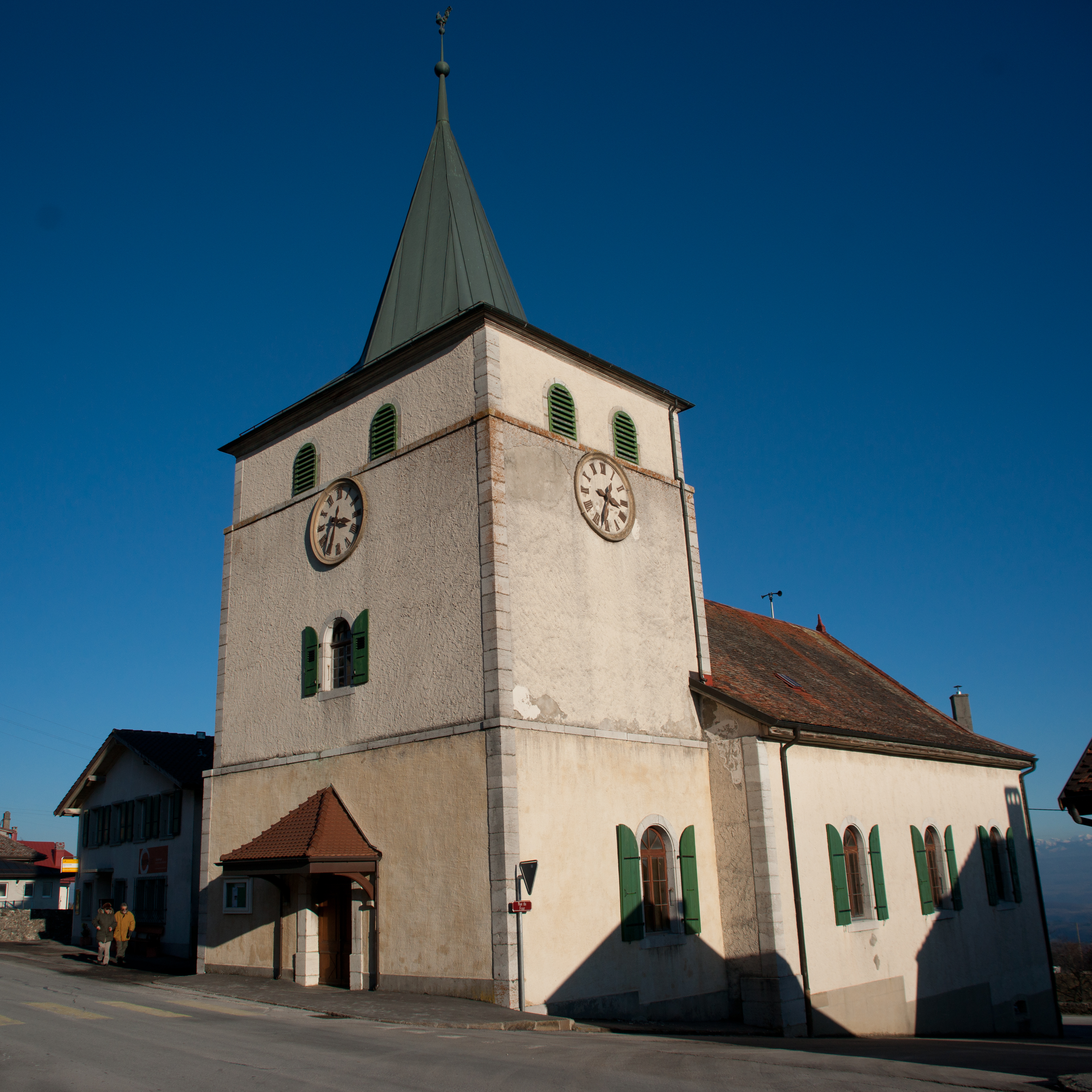 Eglise de Mont-la-Ville, canton de Vaud, Suisse.